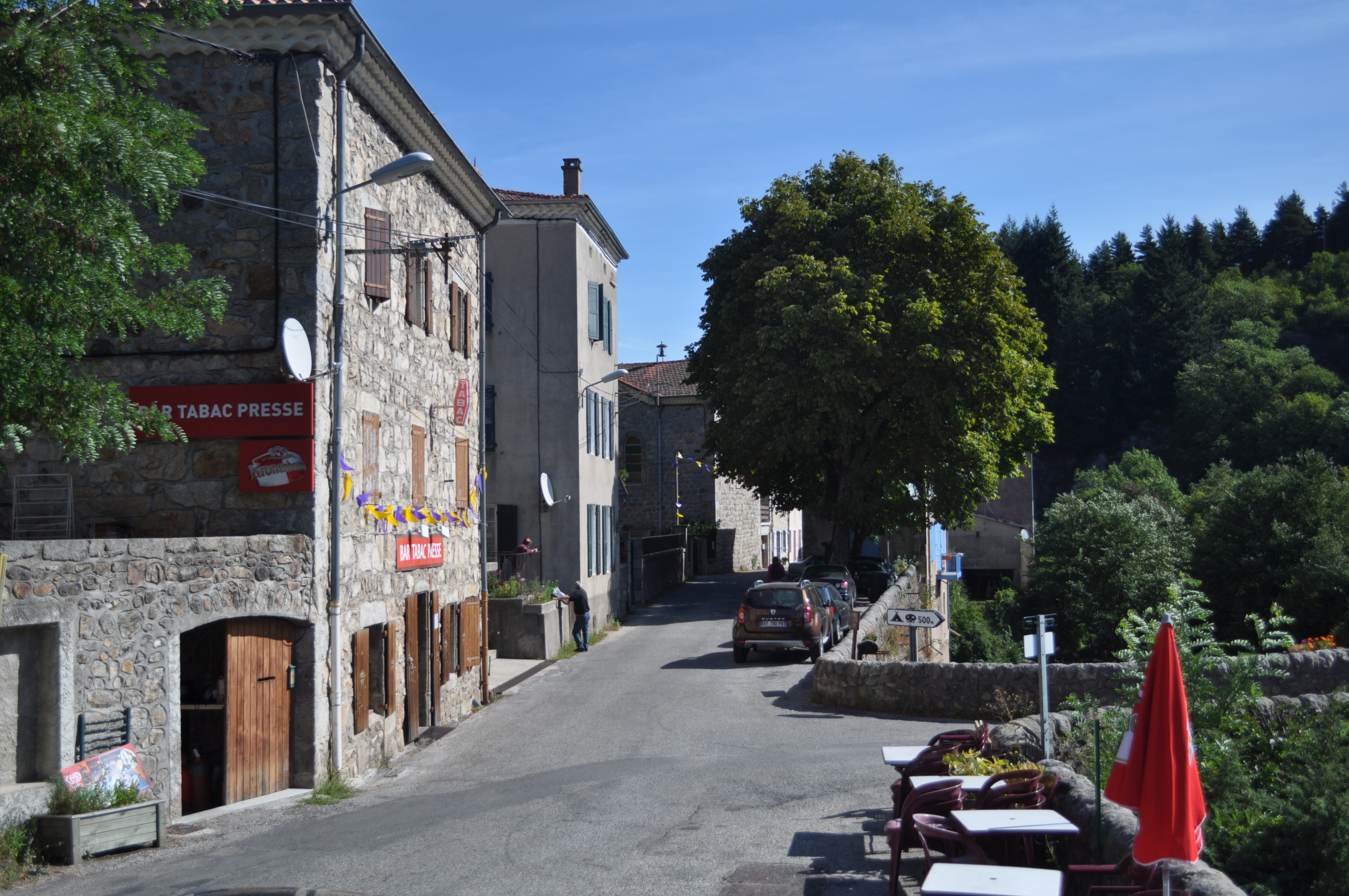 La Grande Rue du village d'Albon (Ardèche)